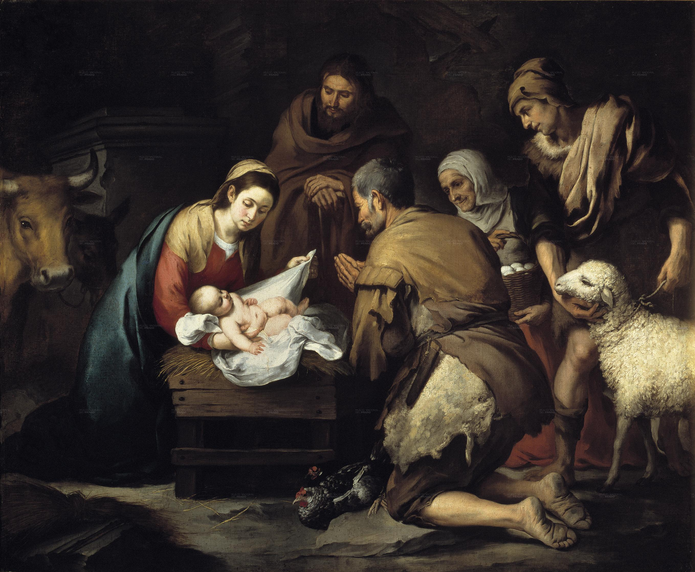 La obra representa el momento en que el Niño Jesús, que aparece desnudo y sostenido por su madre, la Virgen María, fue adorado por los pastores de Belén.